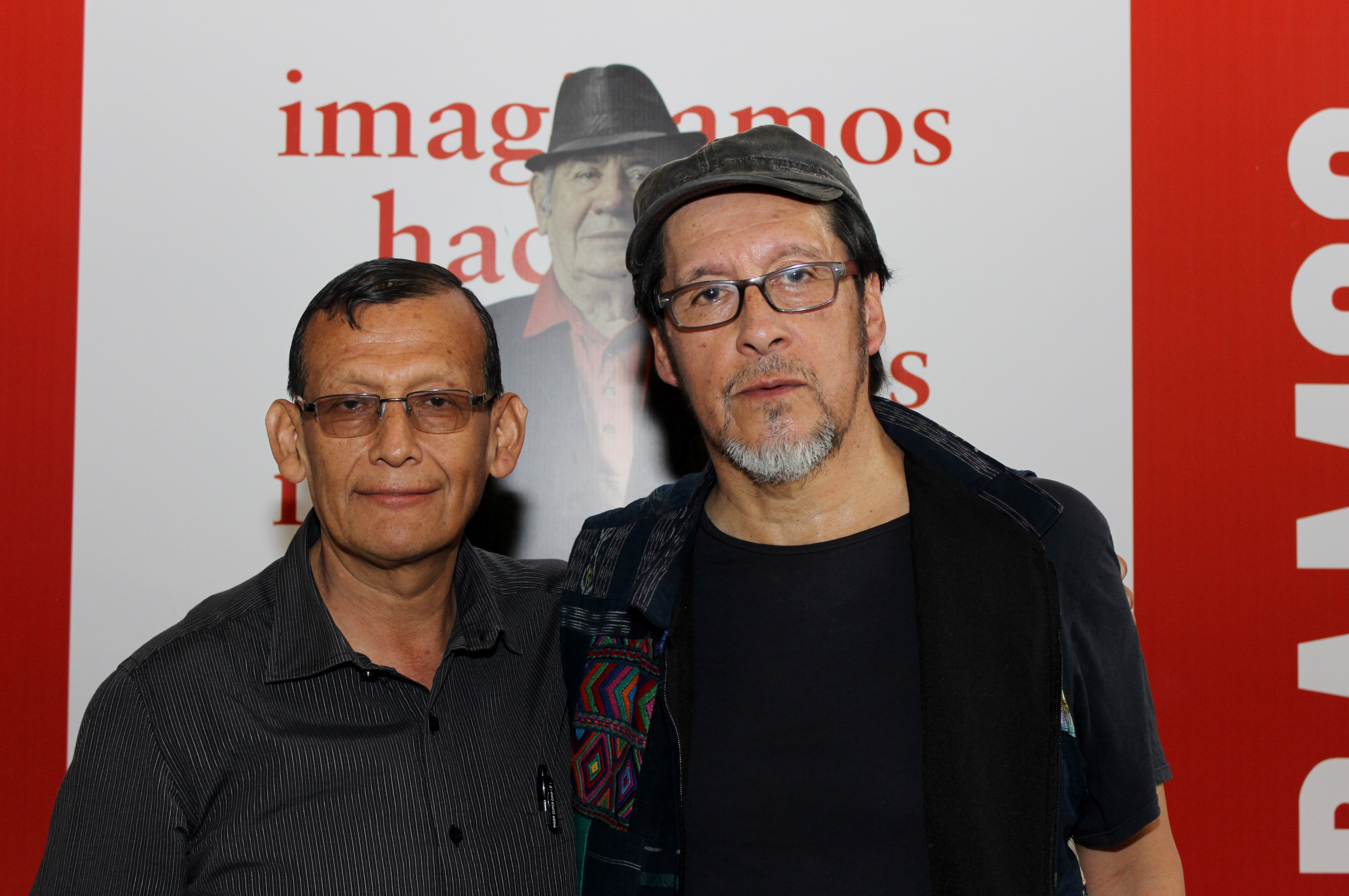 El escritor peruano Pablo Landeo con el poeta chileno mapuche Elicura Chihuailaf en la Feria Internacional del Libro de Santiago 2018.